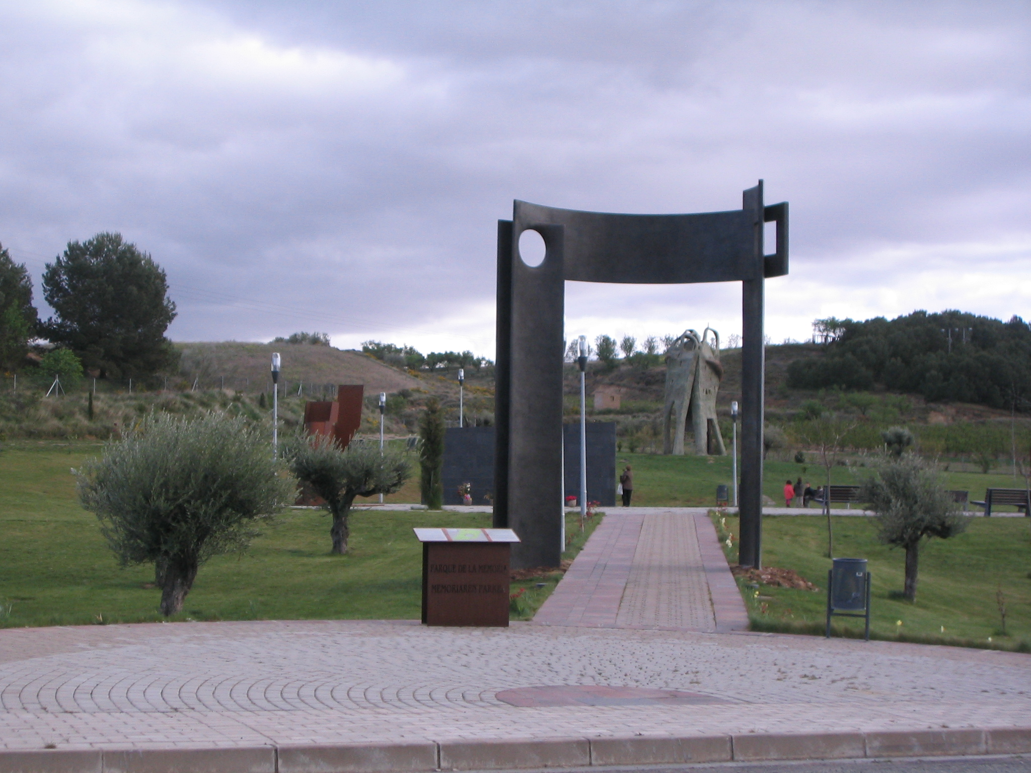 Sartaguda, Navarra (España). Parque de la memoria.